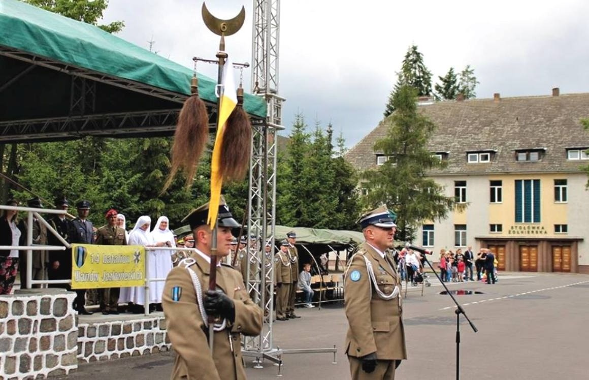 2bzmot, Buńczuk